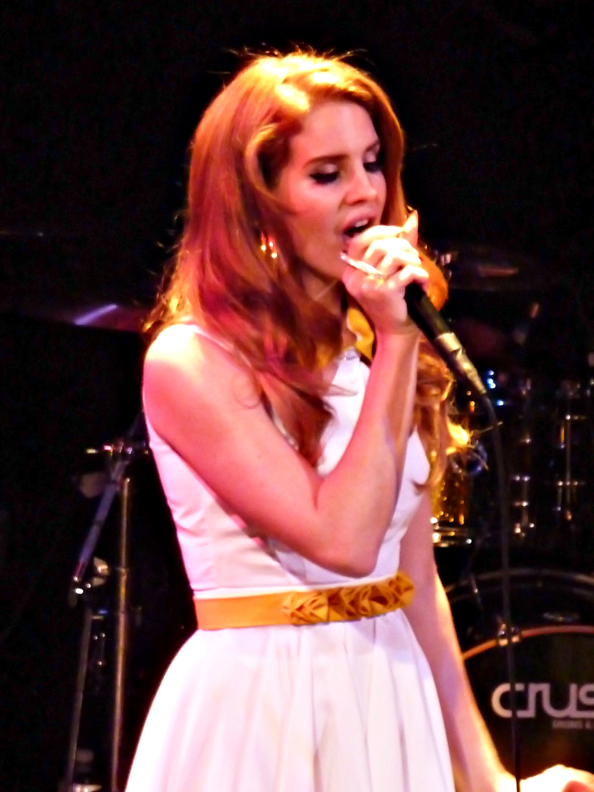 Lana Del Rey P1150611